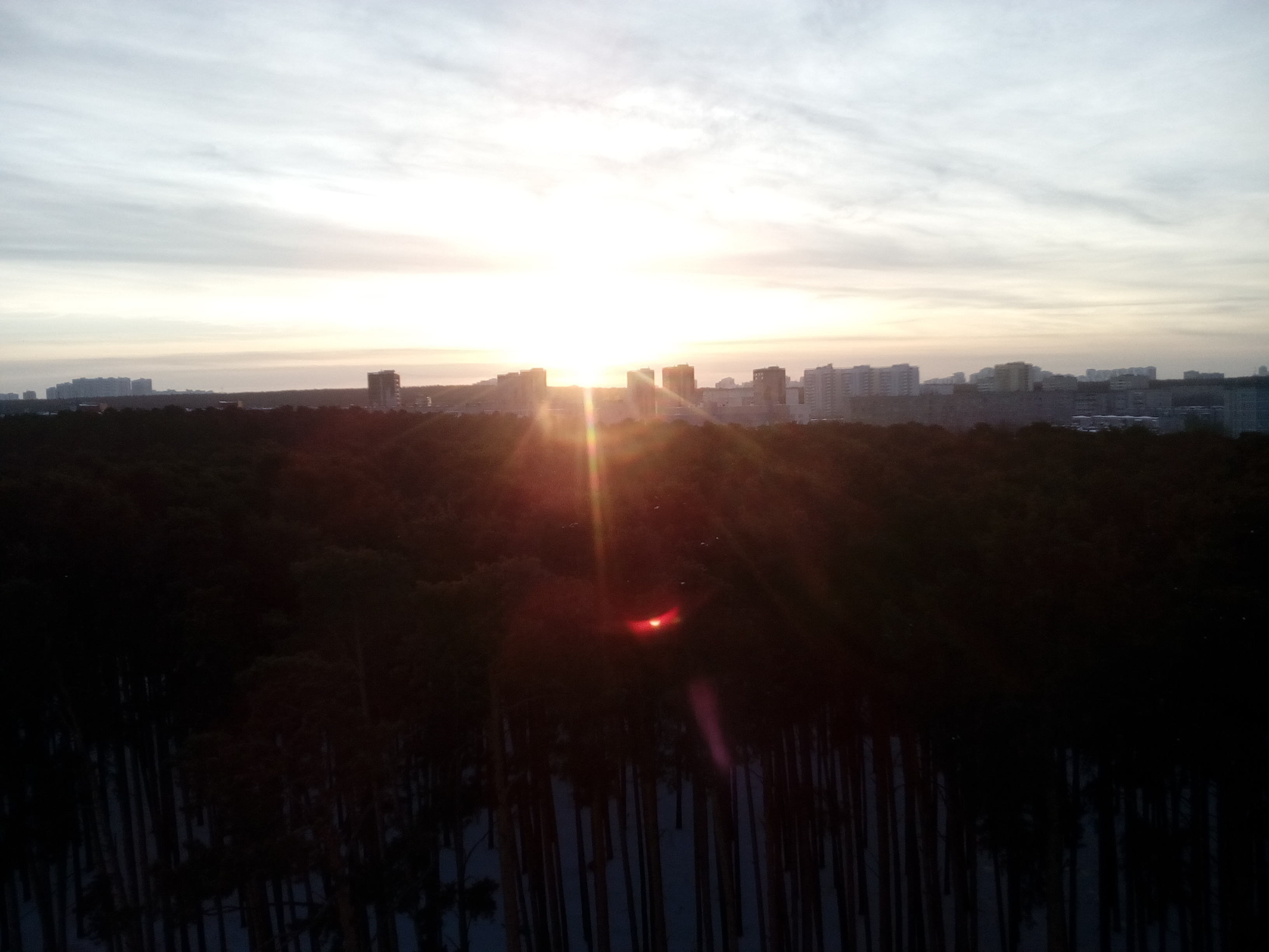 Кыргызча: Екатеринбург